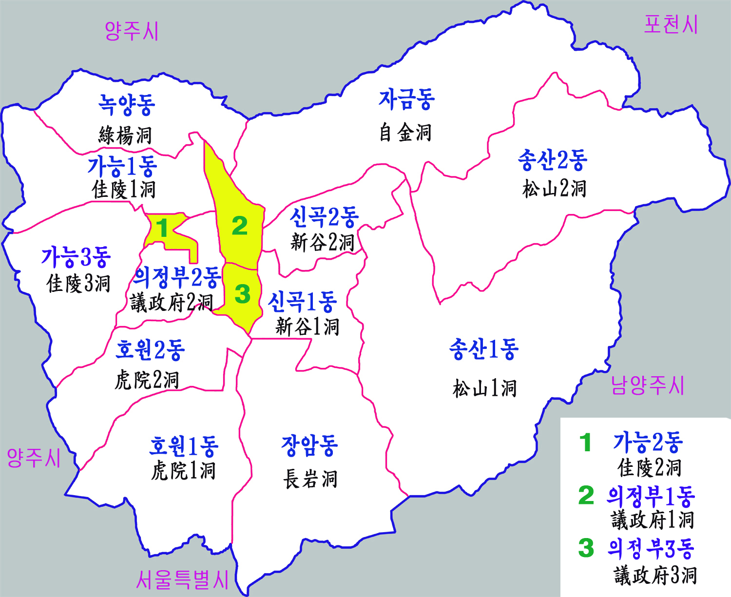 의정부시 행정구역도